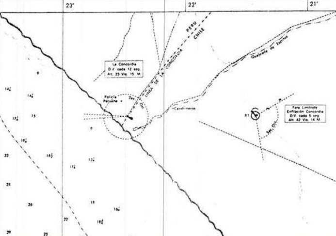 Arica 1973, Carta Náutica Chilena número 101, Servicio Oceanográfico de la Armada de Chile. Ubicación de Policía Peruana y Carabineros de Chile. Ubicación del faro peruano y el faro chileno. Documento presentado por el Gobierno del Peru ante la Corte Internacional de Justicia en la Controversia Marítima (Perú v. Chile)